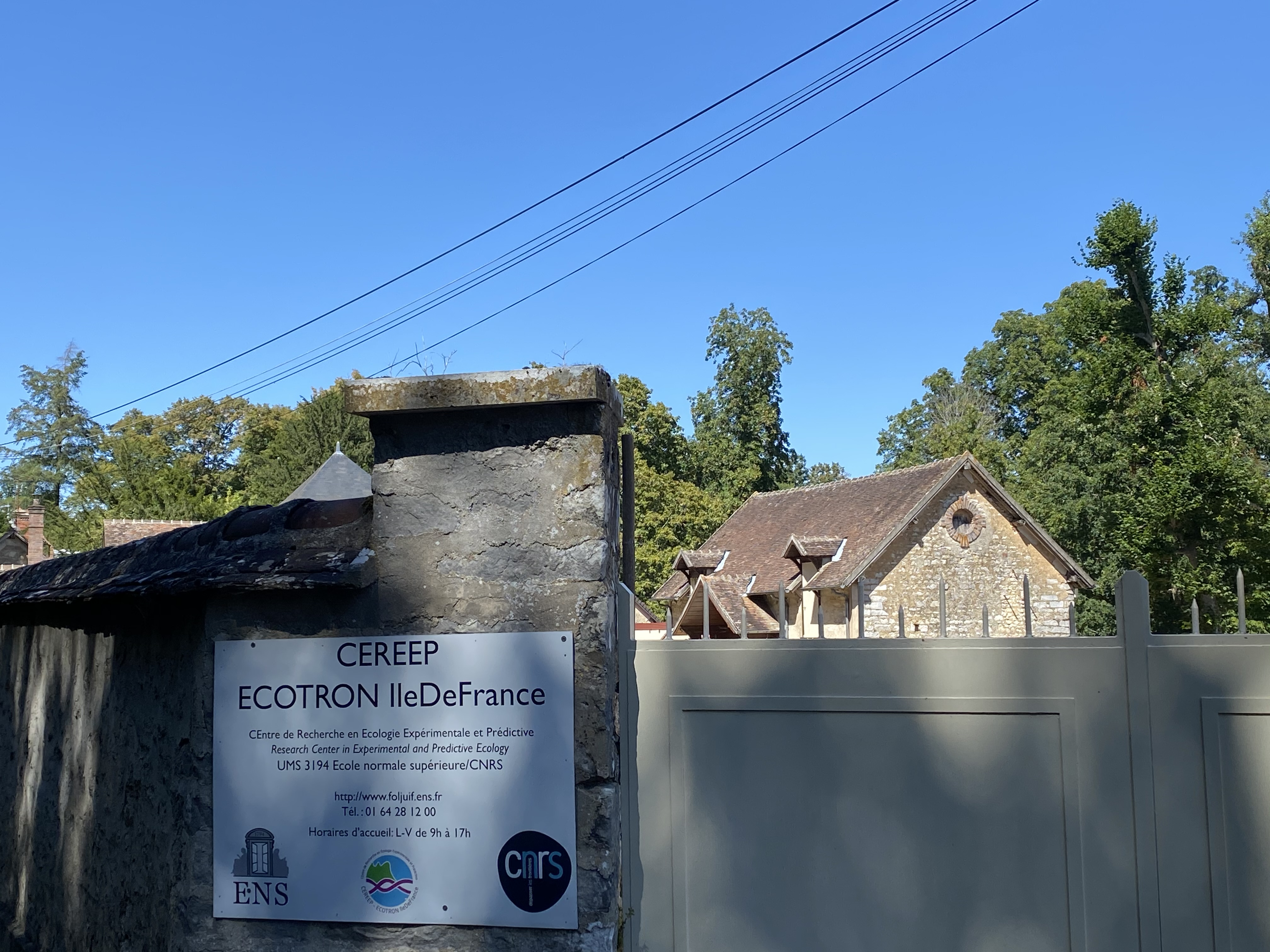 Ecotron Île-de-France Ecole Normale Supérieure (ENS), CNRS, Centre de Recherche en Ecologie Expérimentale et Prédictive